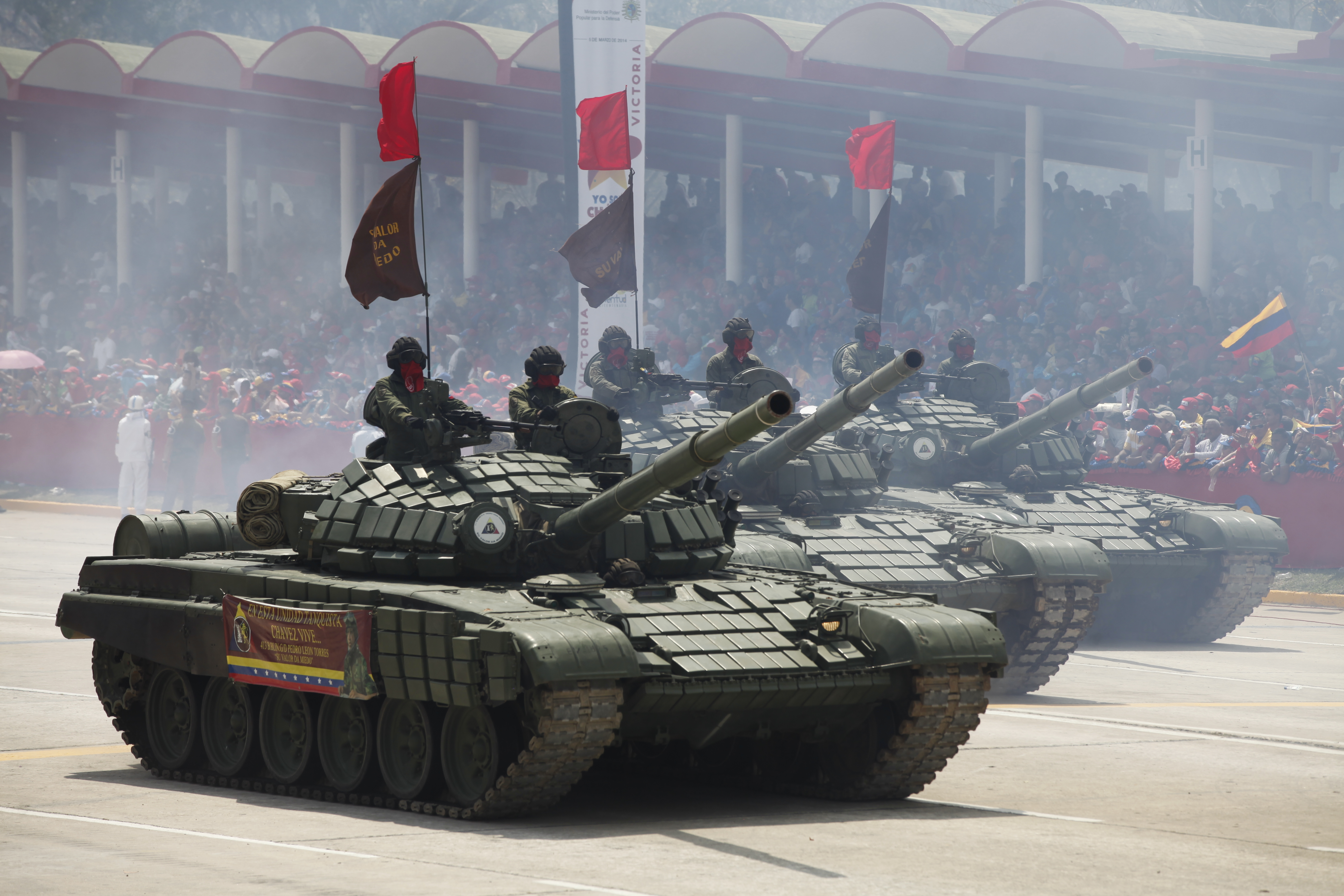 Caracas, Canciller Ricardo Patiño participó en los actos de conmemoración de la muerte de Hugo Chávez